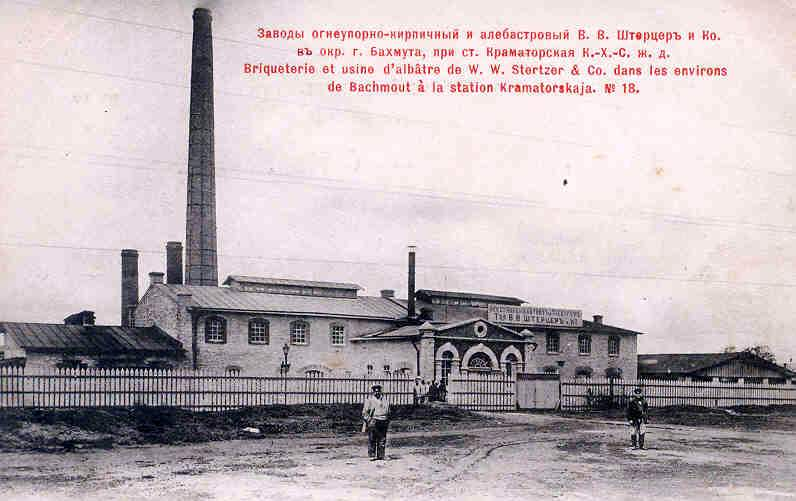 Дореволюционная открытка Бахмута